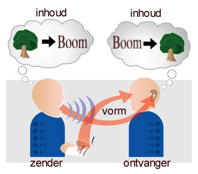 Communication emisor